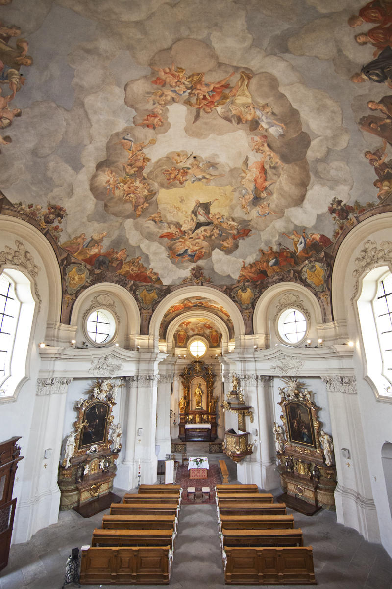 Innenraum der Kirche St. Johannes von Nepomuk am Felsen in Prag